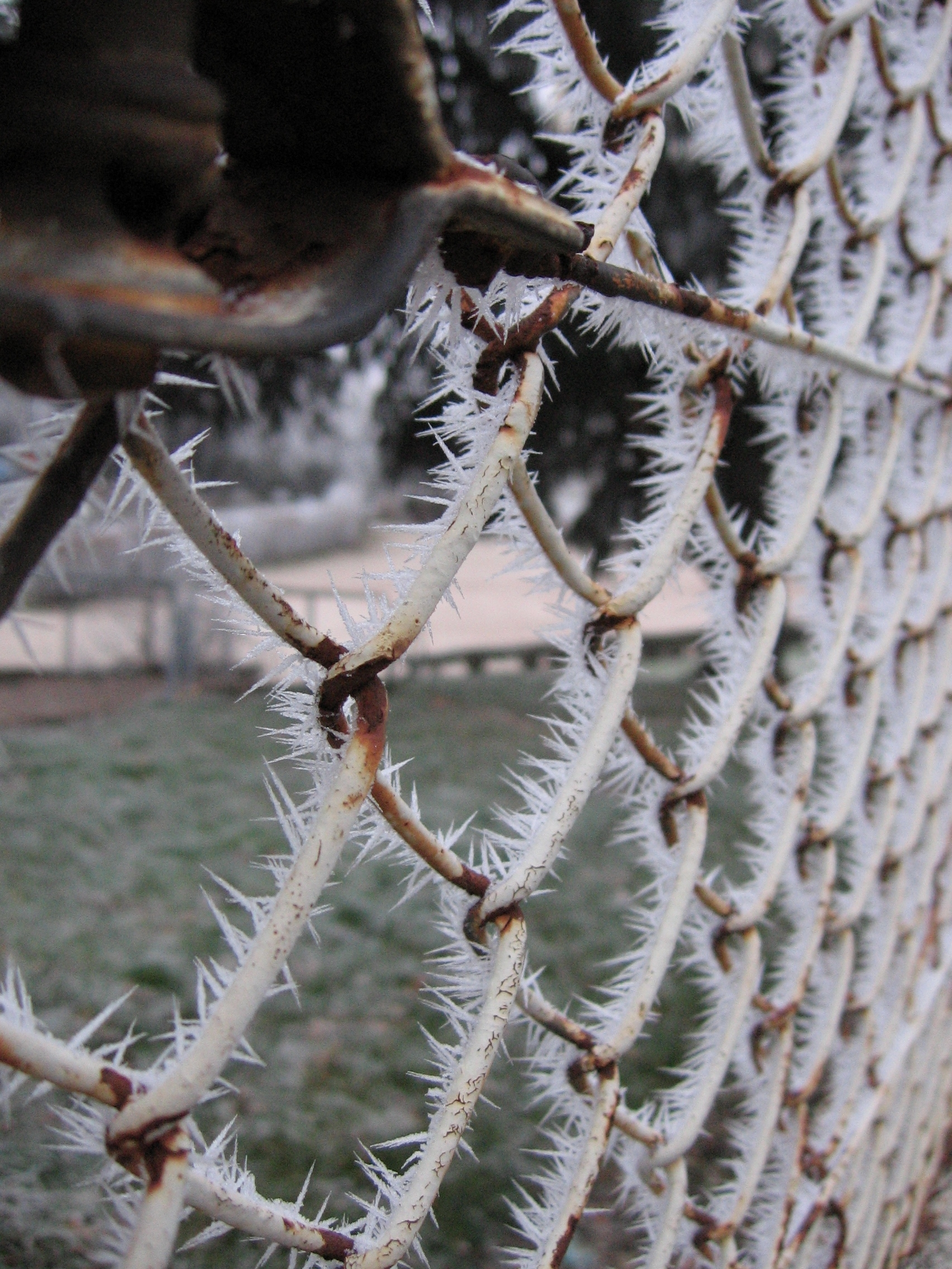 Un grillage métalique recouvert de givre